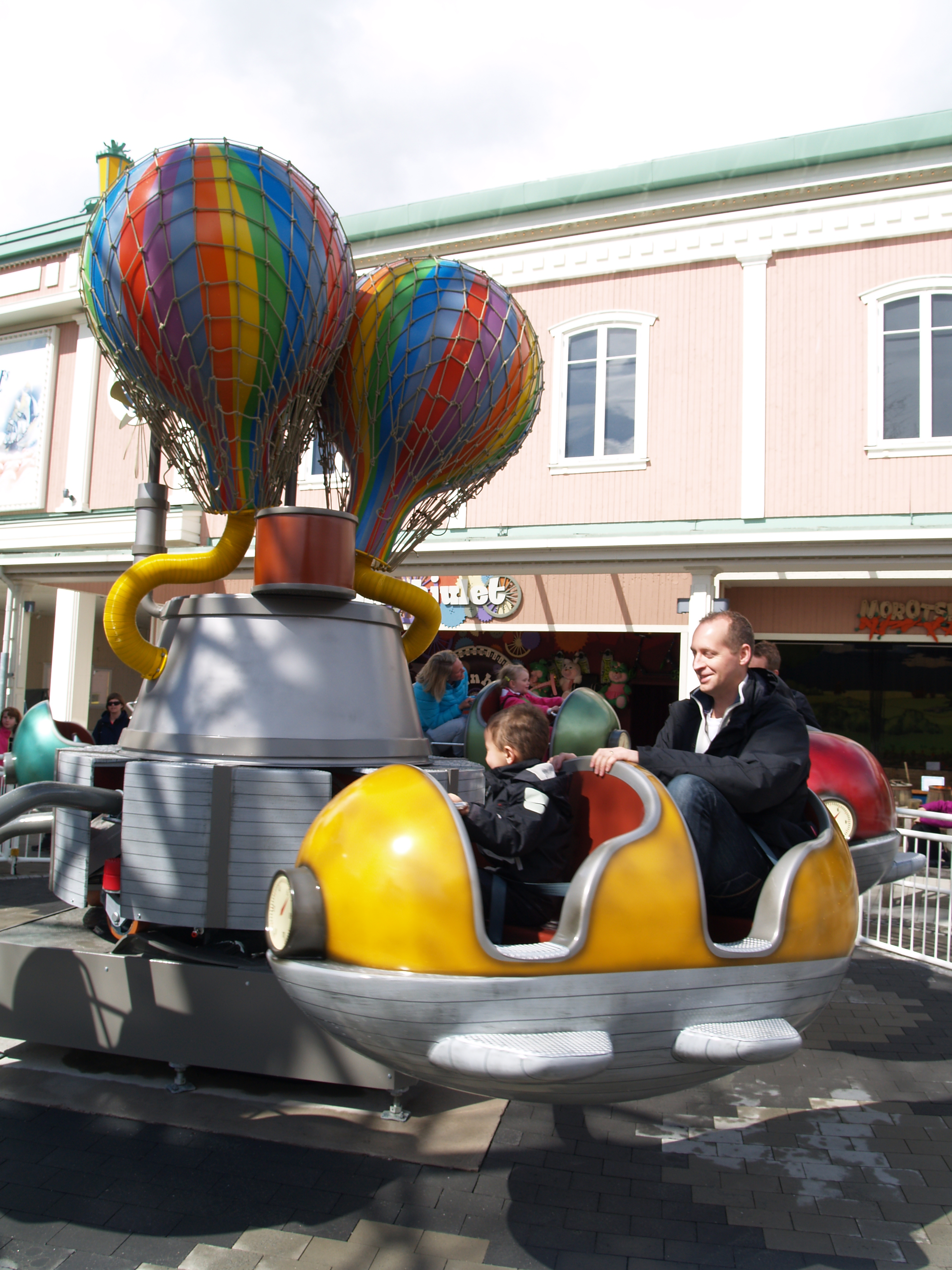 Åkattraktionen Hoppalång i nöjesparken Liseberg.